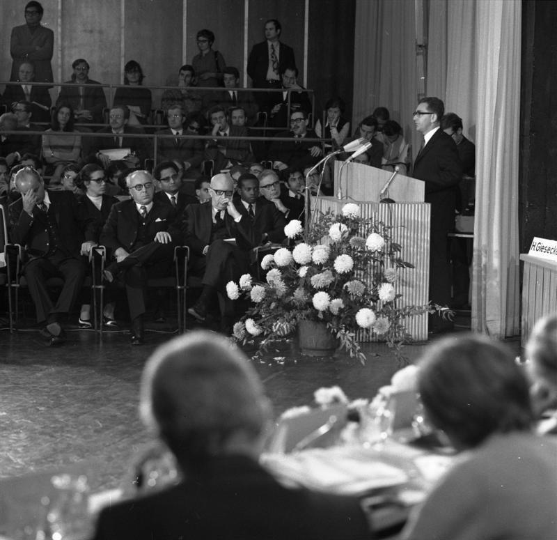 Erste Sitzung des Deutschen Forums für Entwicklungspolitik in der Bonner Beethovenhalle (Gäste: Erzbischof Camara und Bundespräsident Heinemann)